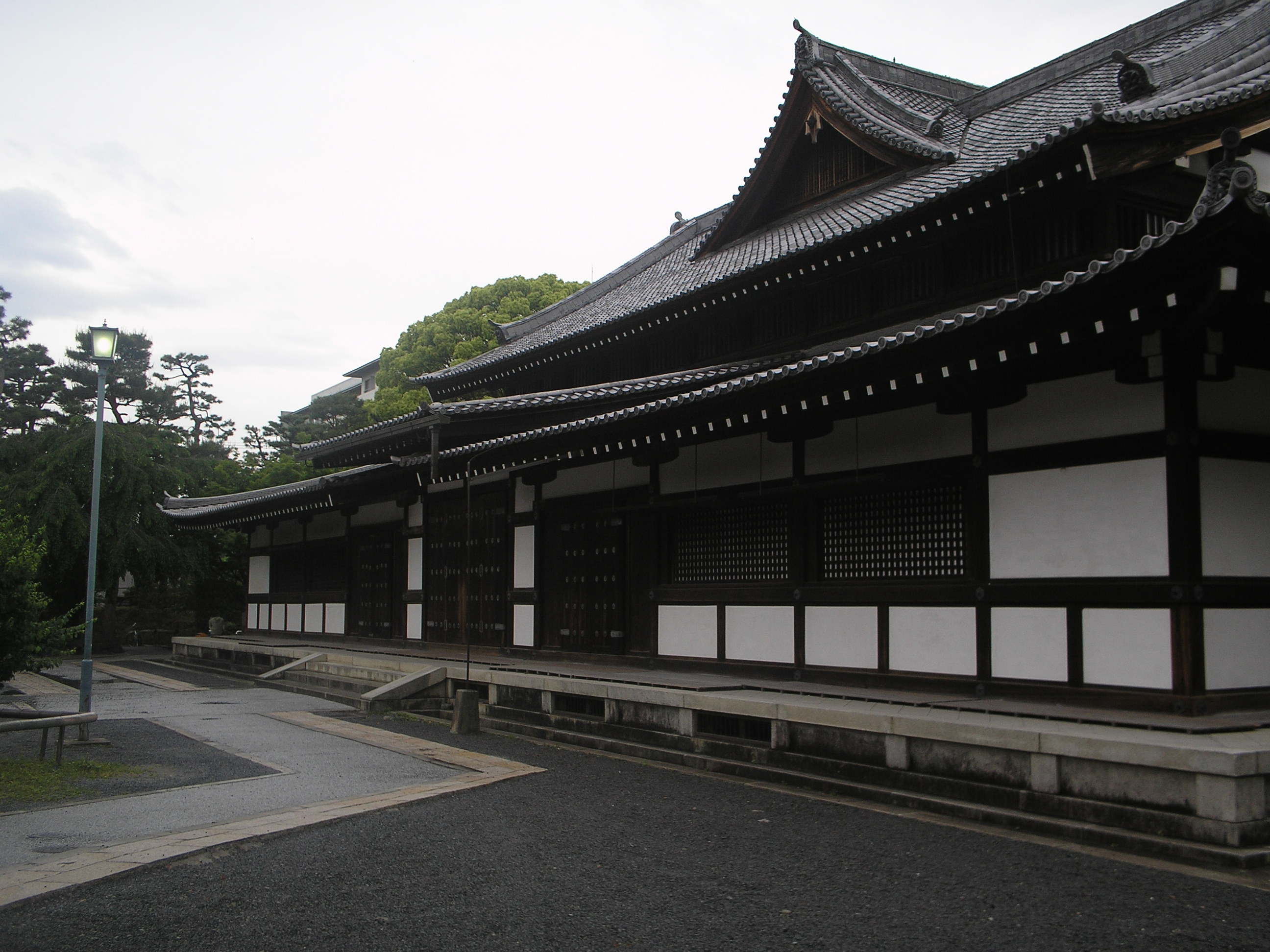 Dai Nippon Butoku Kai, Kyoto, Japan.